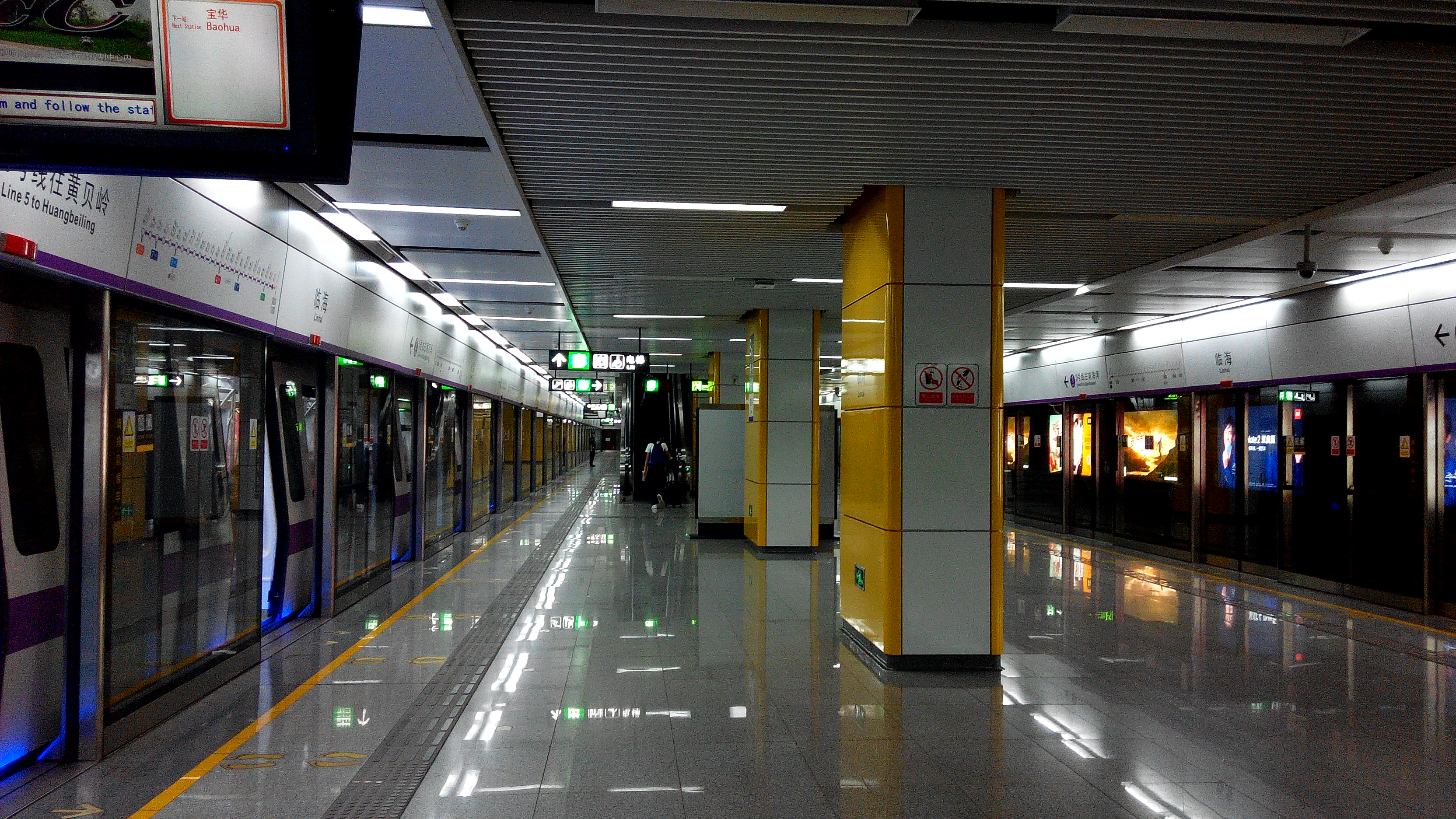 深圳地铁5号线 临海站站台